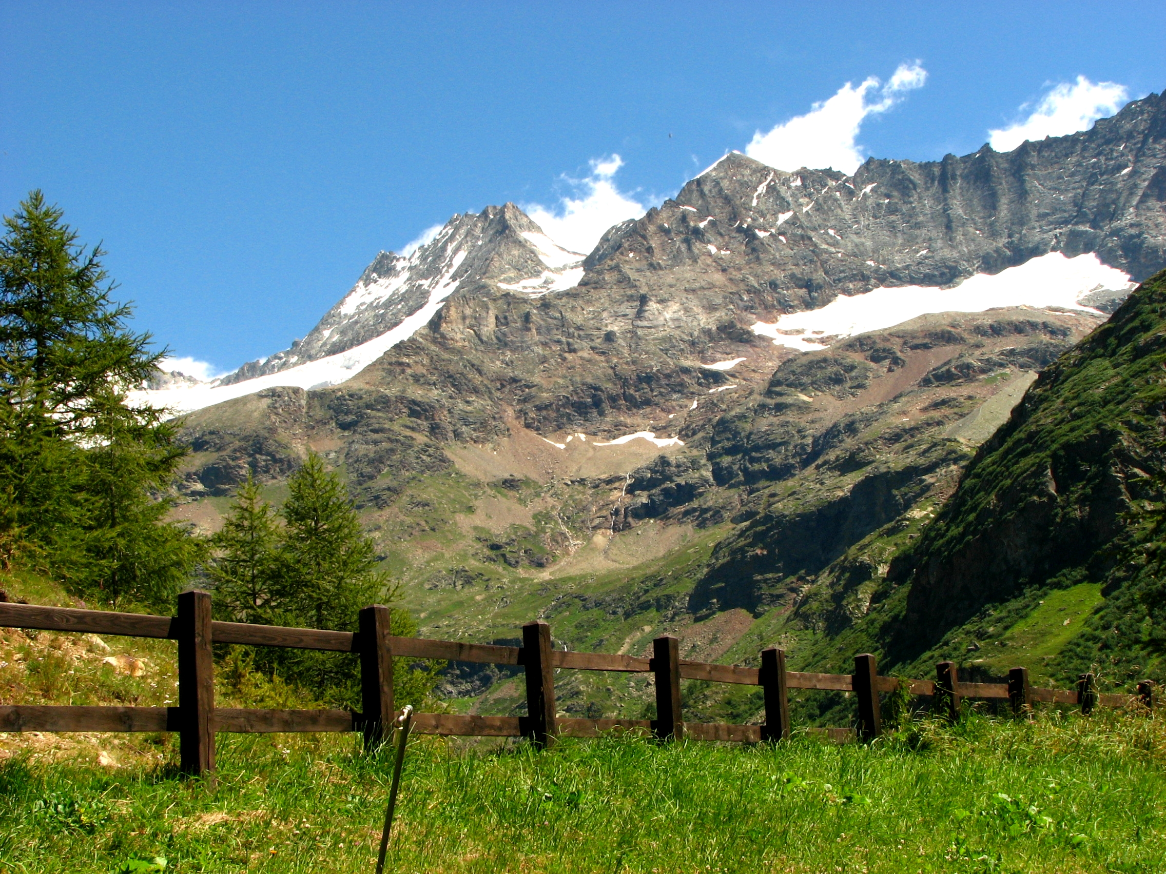 Dent d'Hérens This is a photo of a monument which is part of cultural heritage of Italy.